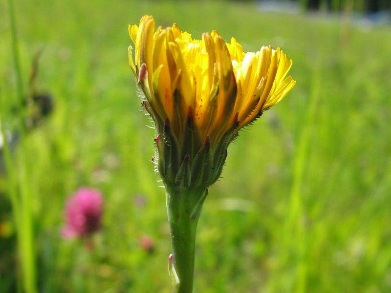 Gewöhnliches Ferkelkraut Hypochaeris radicata, Stoltera Nähe Rostock